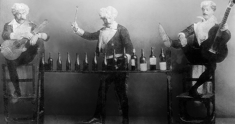 Imagen de estudio de esta agrupación artística